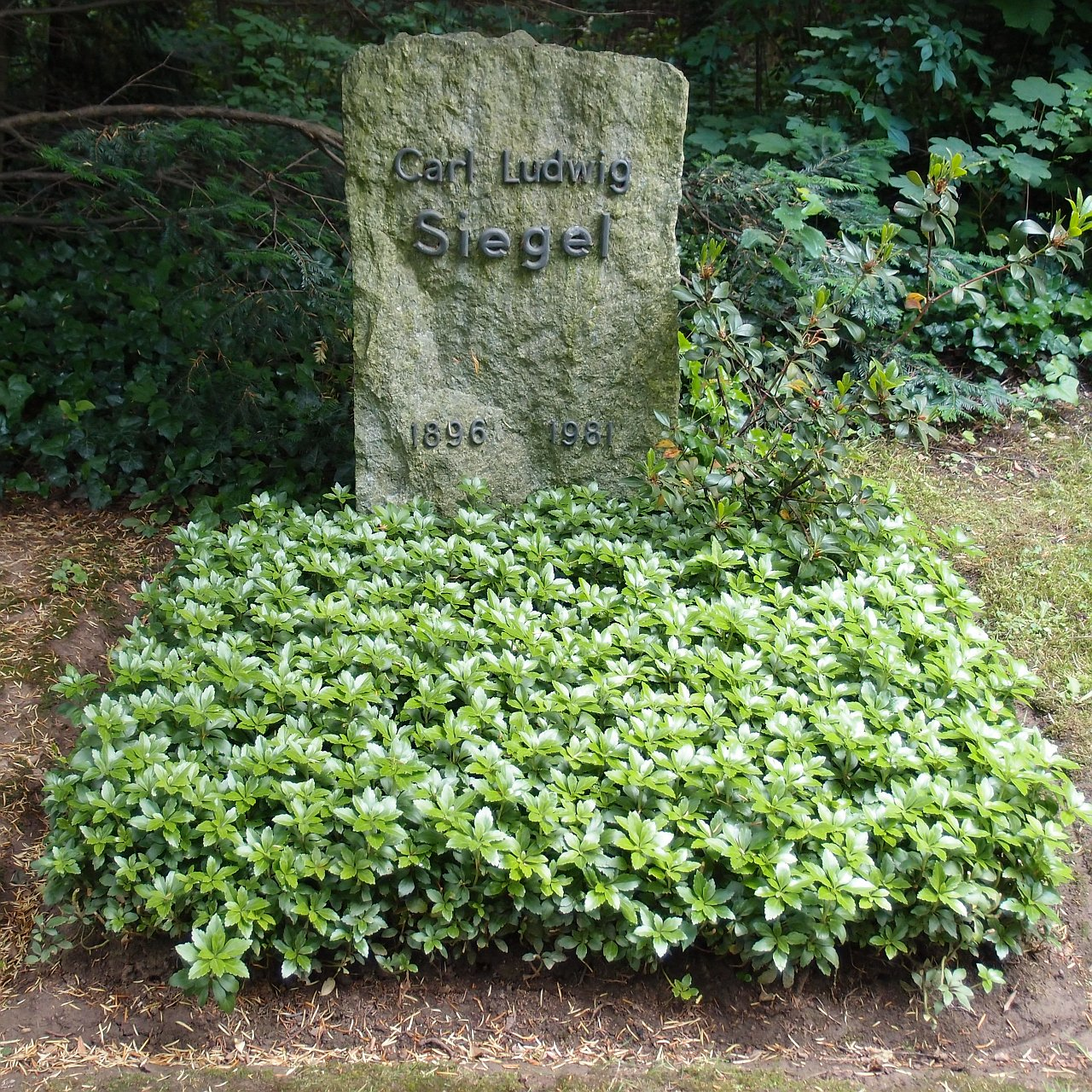 Grab von Carl Ludwig Siegel im Friedhof an der Kassler Landstraße in Göttingen